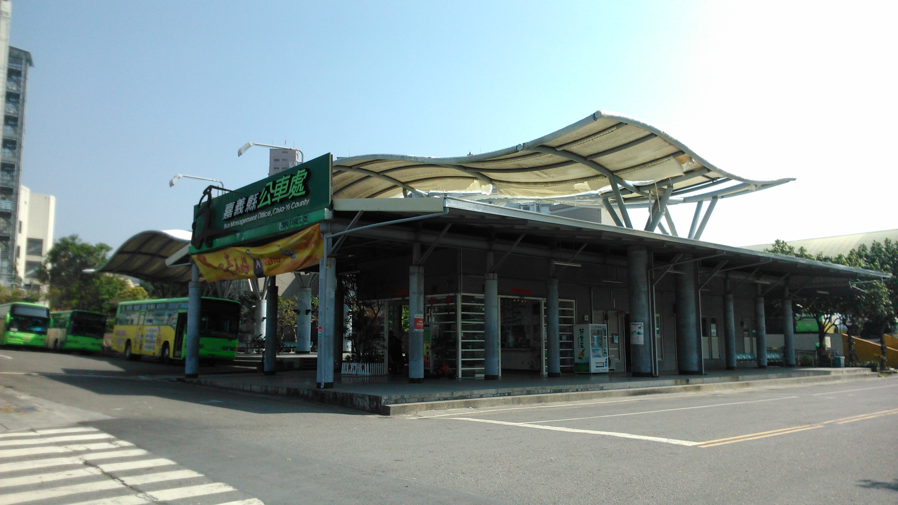 公営嘉義県バス大雅ターミナル